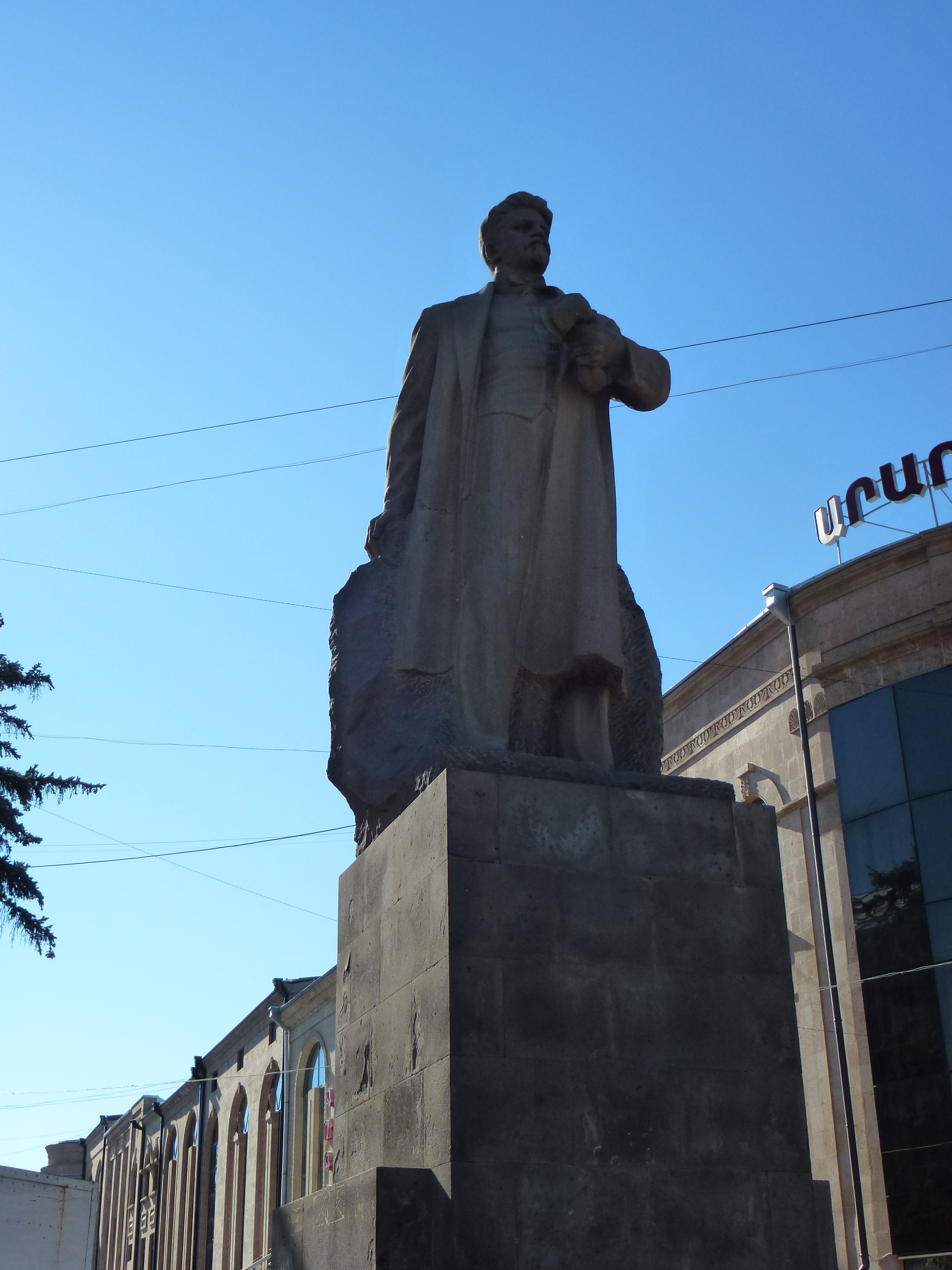 Ստեփան Շահումյանի արձանը Գյումրիում 1/4.888